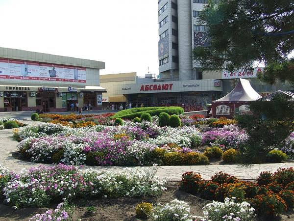 Центр города Караганды